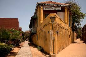 Musée Henriette Bathily de Gorée(GOREE-SENEGAL)